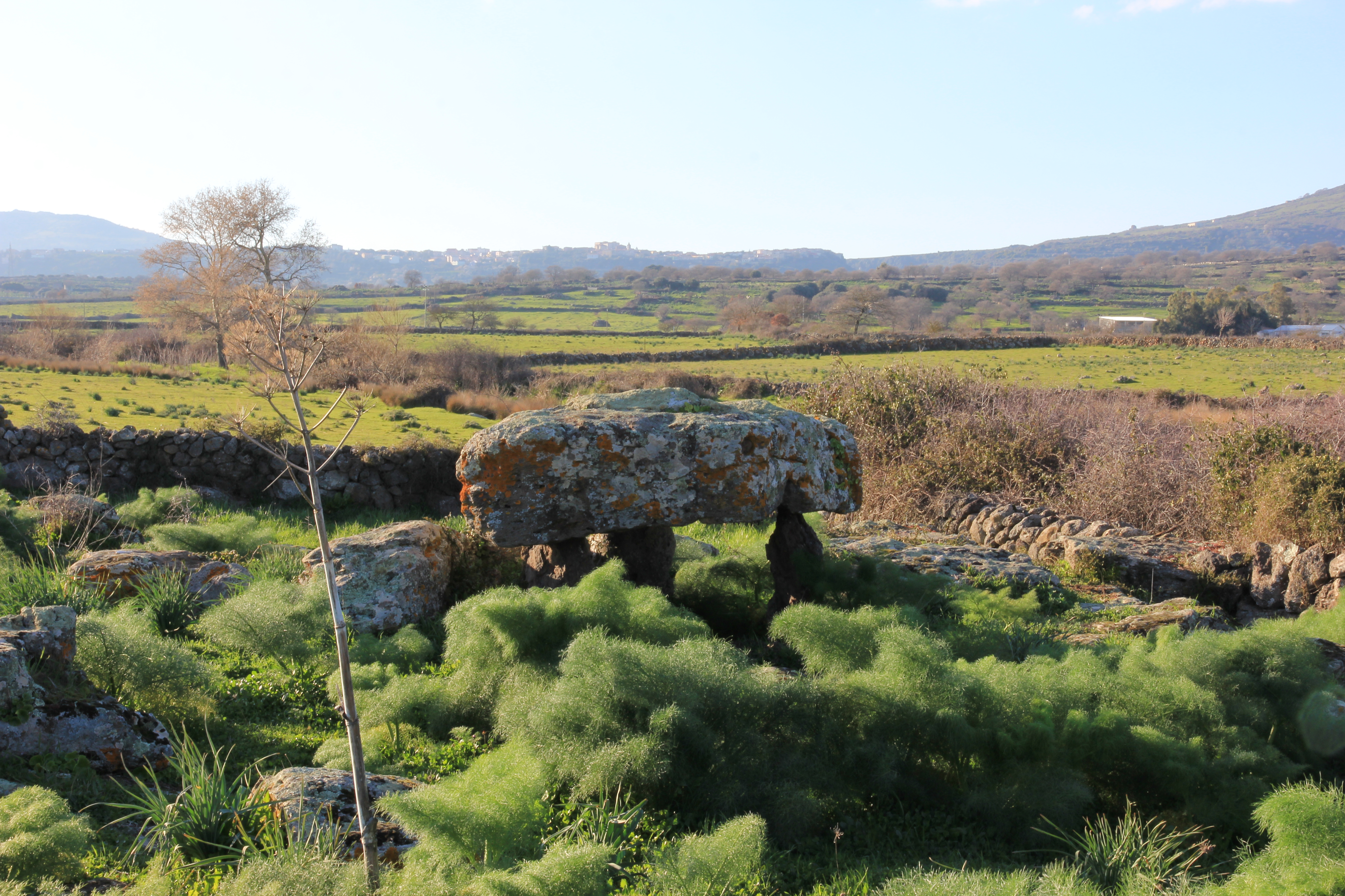 Birori - Dolmen di Sarbogadas - di Sarbogadas